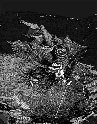 «Nils Klims fall til den underjordiske verden» av Jens Juel, 1789.